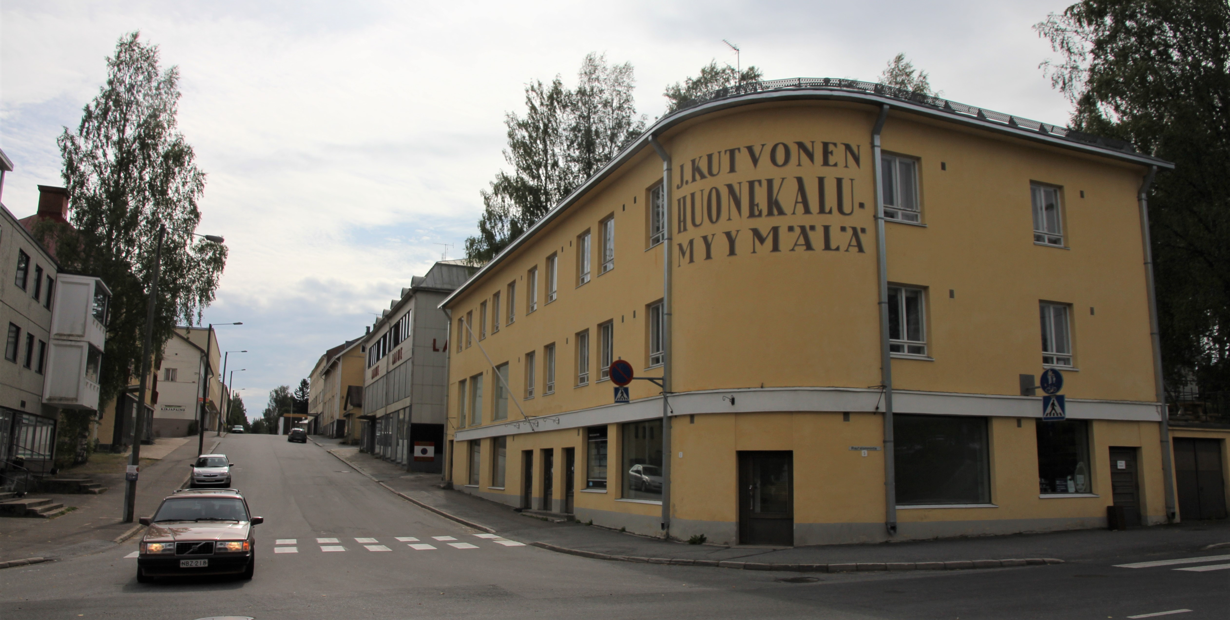 Suonenjoen rautatieasema ympäristöineen: Asemakadun alkua (Asemakatu 2 eli Kutvosen liiketelo, 4, 6 ja 8), Suonenjoki. Koordinaatit osoittavat Kutvosen liiketaloon.